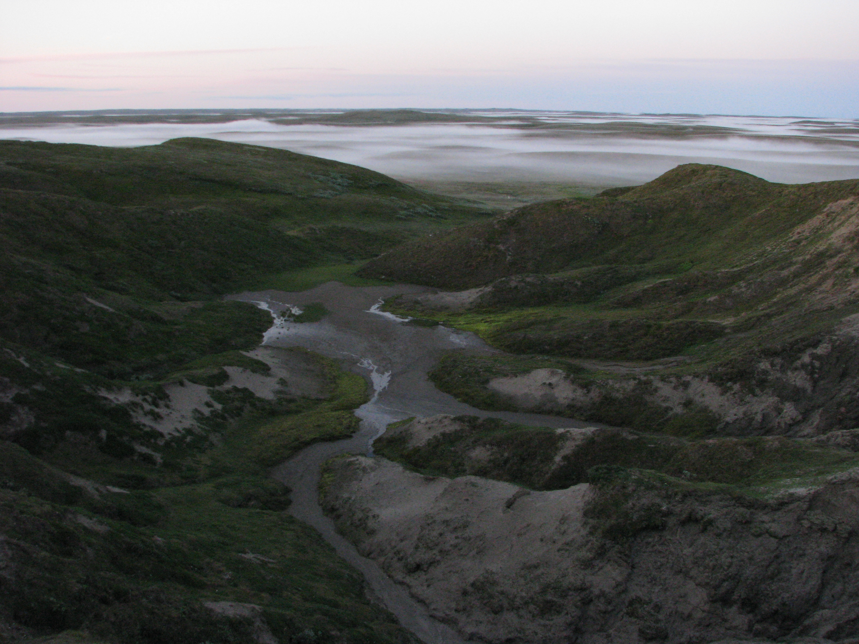 Колгуев остров, Заполярный район. This image is related to the protected area of Russia number 8310013